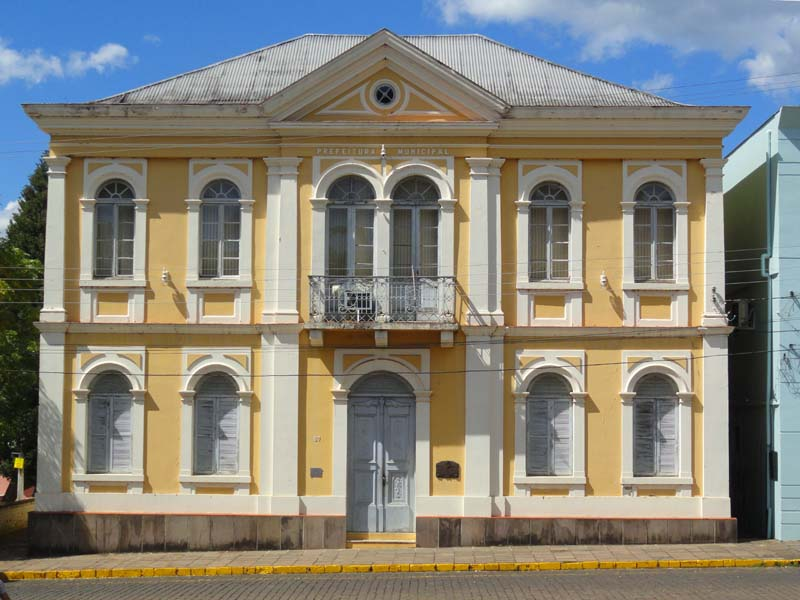 Centro Histórico de Antônio Prado - Prefeitura. Construída entre 1896 e 1900 para ser a casa de Vittorio Faccioli, nunca foi usada como residência, servindo desde o início como sede do Executivo Municipal.